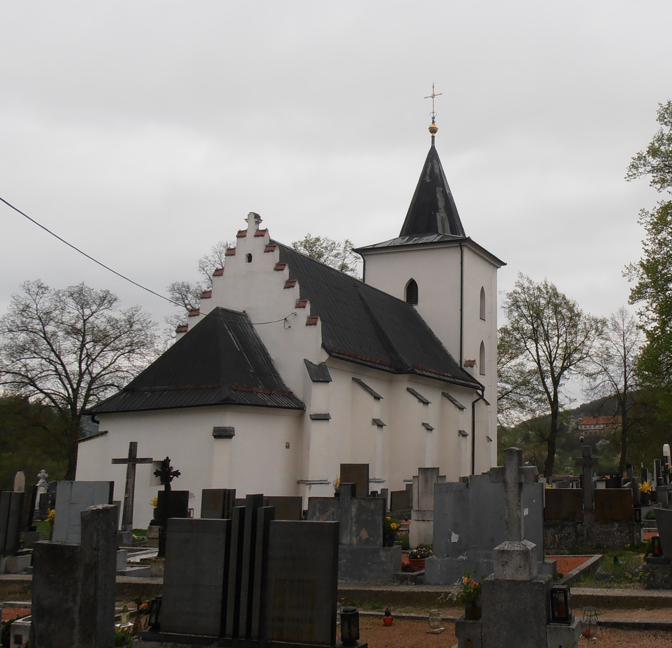 Kostel svatého Filipa a Jakuba v Lelekovicích